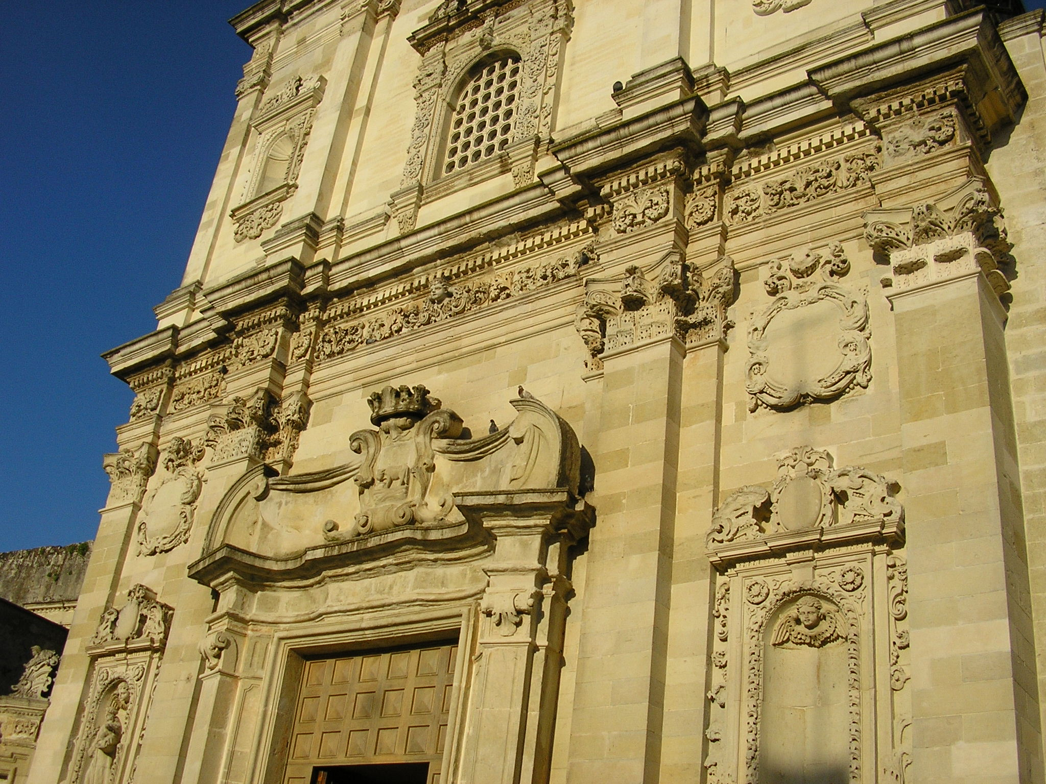 paqrticular of dome in Poggiardo